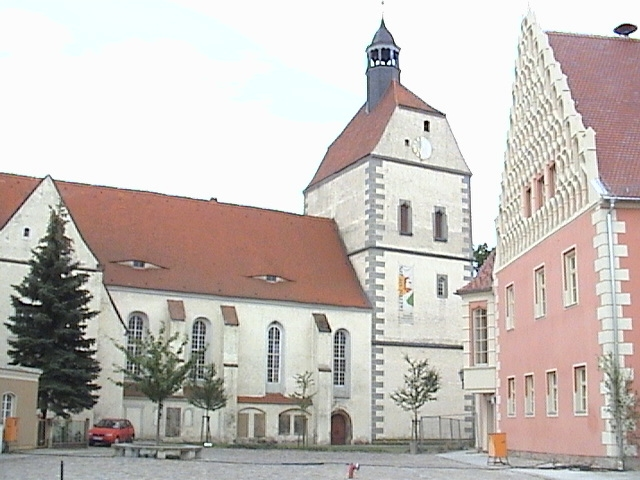 Rathaus und Frauenkirche